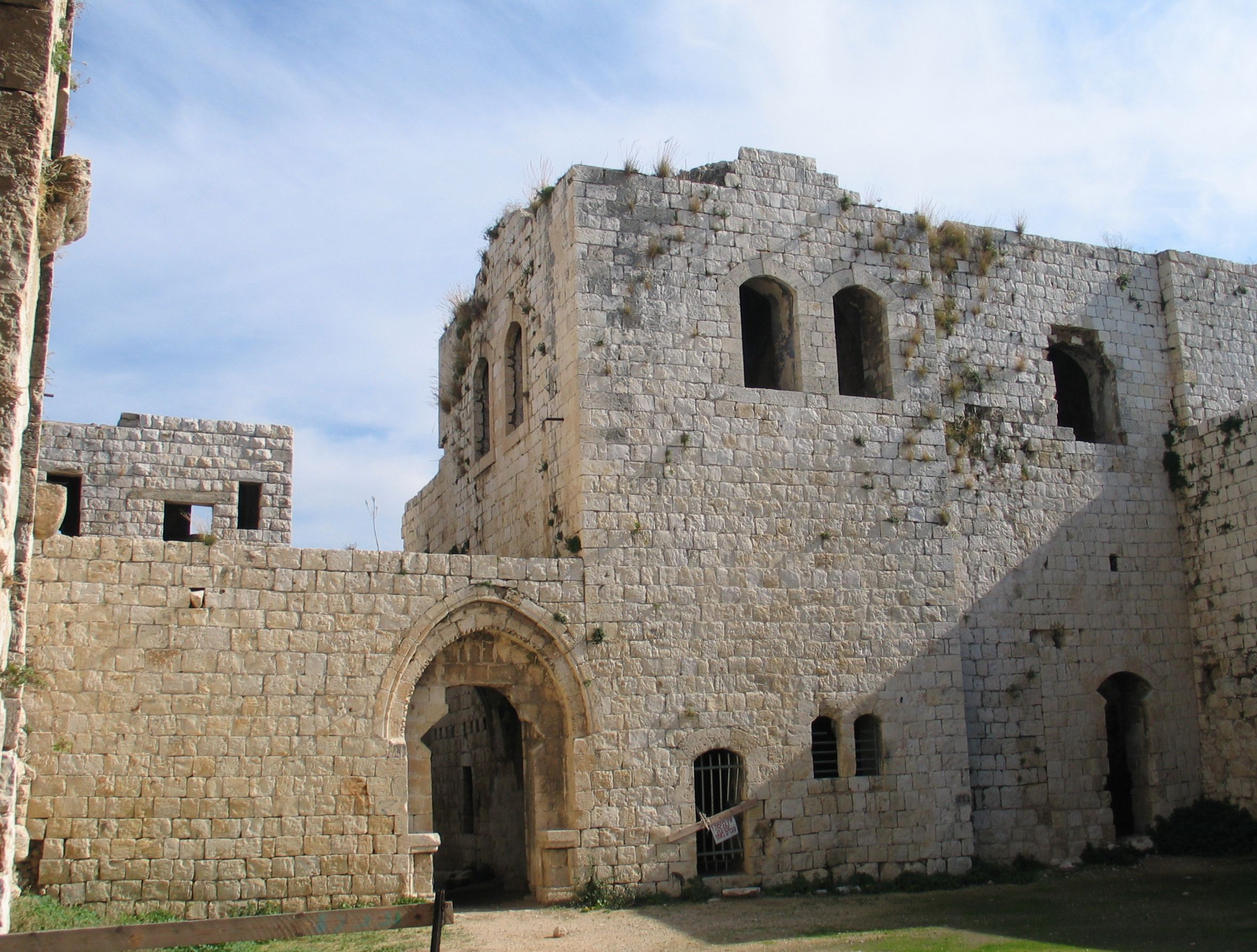 Migdal Afek, Israel.